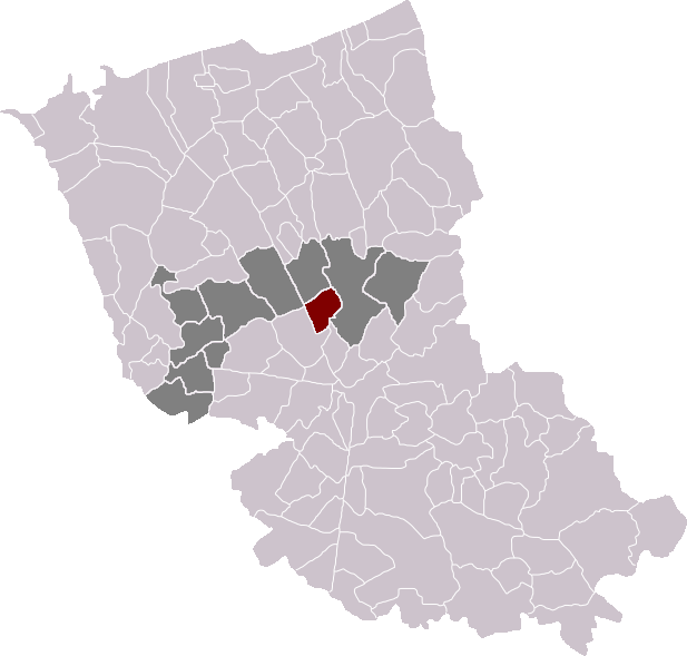 Locatie gemeente Ledringem in arrondissement Duinkerke. Zelfgemaakt. Location of Ledringhem municipality in the arrondissement of Dunkirk. Self made. Localisation de la commune de Ledringhem dans l'arrondissement de Dunkerque. Fait moi-même.